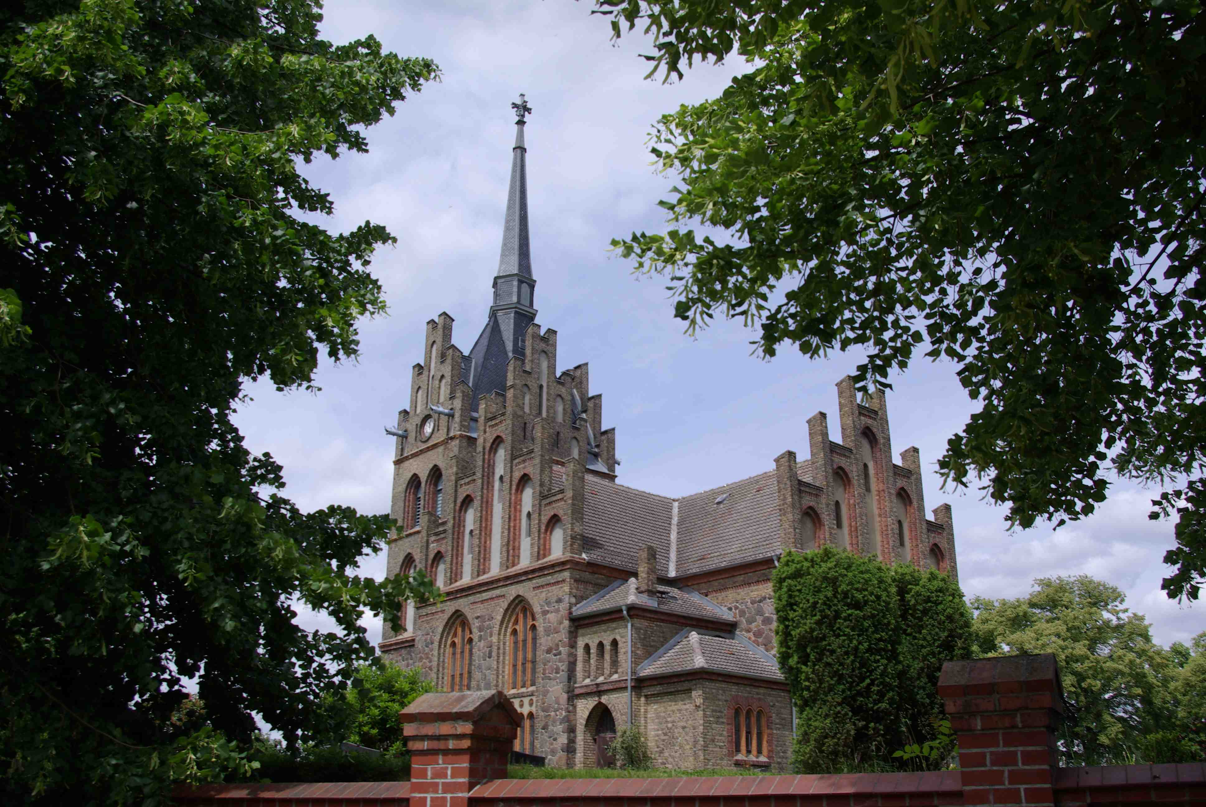 Rietz-Neuendorf in Brandenburg. Im Ortsteil Herzberg steht diese Kirche, sie steht unter Denkmalschutz.